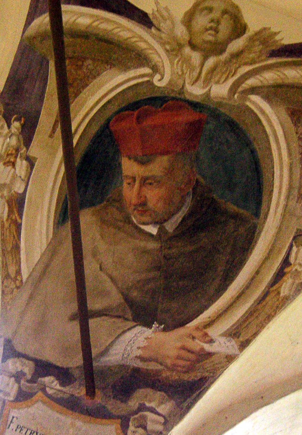 Particolare affresco del Chiostro di Ognissanti. Ritratto il Cardinale Pierre de Foix il Vecchio con berretta porpora e mozzetta marrone, tipica dell'ordine francescano cappuccino, secondo l'uso degli abiti religiosi prima del 1968.